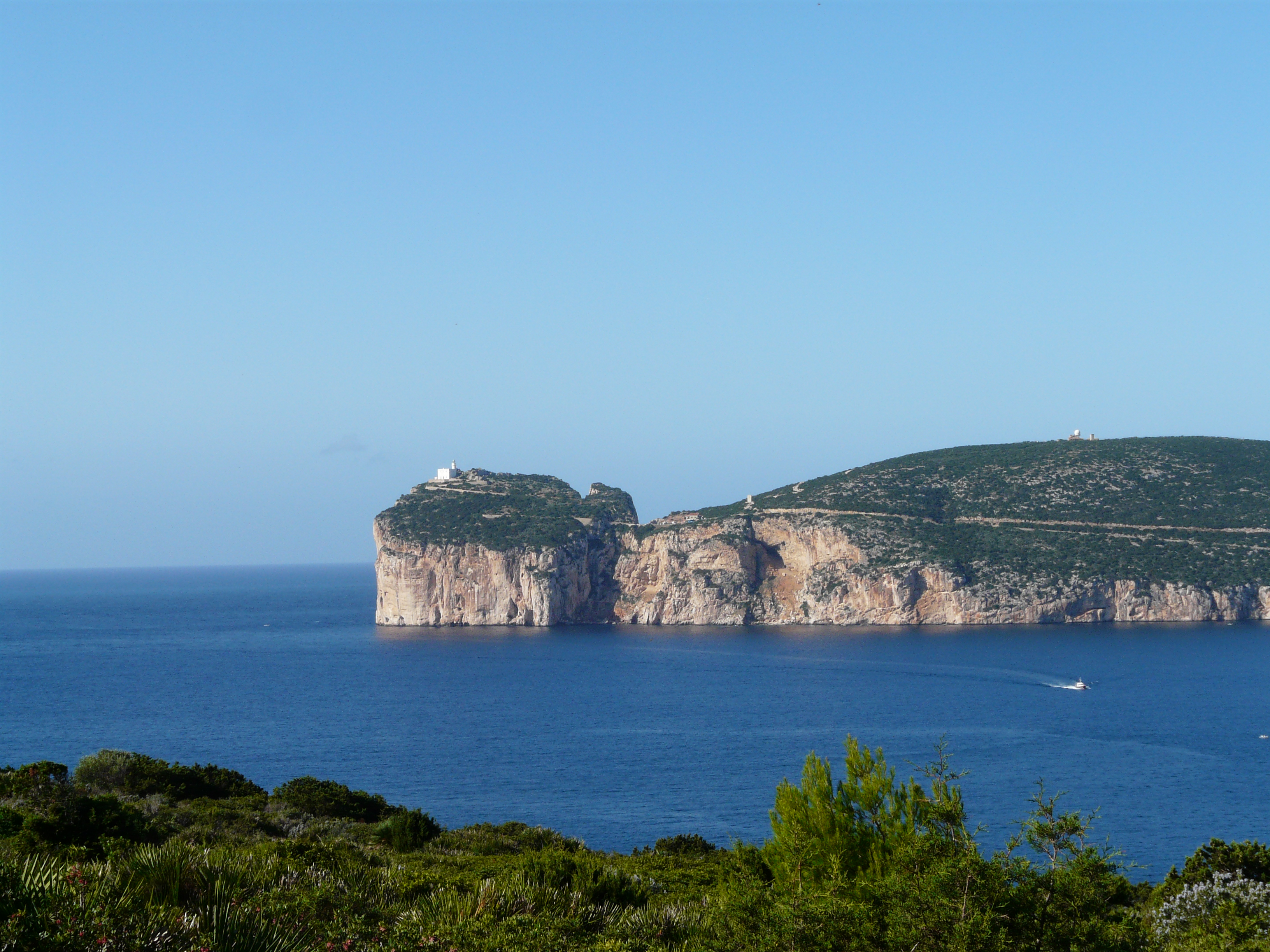 Capo Caccia seen from Punta Giglio, Sardinia, Italy.